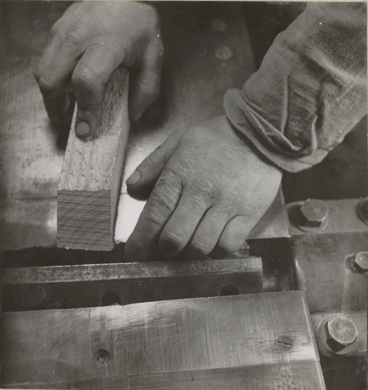 Collectie / Archief : Fotocollectie Arbeidsinspectie Reportage / Serie : Vlakbank Beschrijving : Bovenaanzicht van een vlakbank met oude, vierkante beitelas die het grote gevaar aantoont dat hierbij kan optreden Datum : ongedateerd Trefwoorden : houtbewerkingsmachines, houtindustrie, schaafmachines Fotograaf : Oorthuys, Cas Auteursrechthebbende : Nationaal Archief Materiaalsoort : Foto (zwart/wit) Nummer archiefinventaris : bekijk toegang 2.24.03 Inventarisnummer : 1735 Bestanddeelnummer : 256-4054